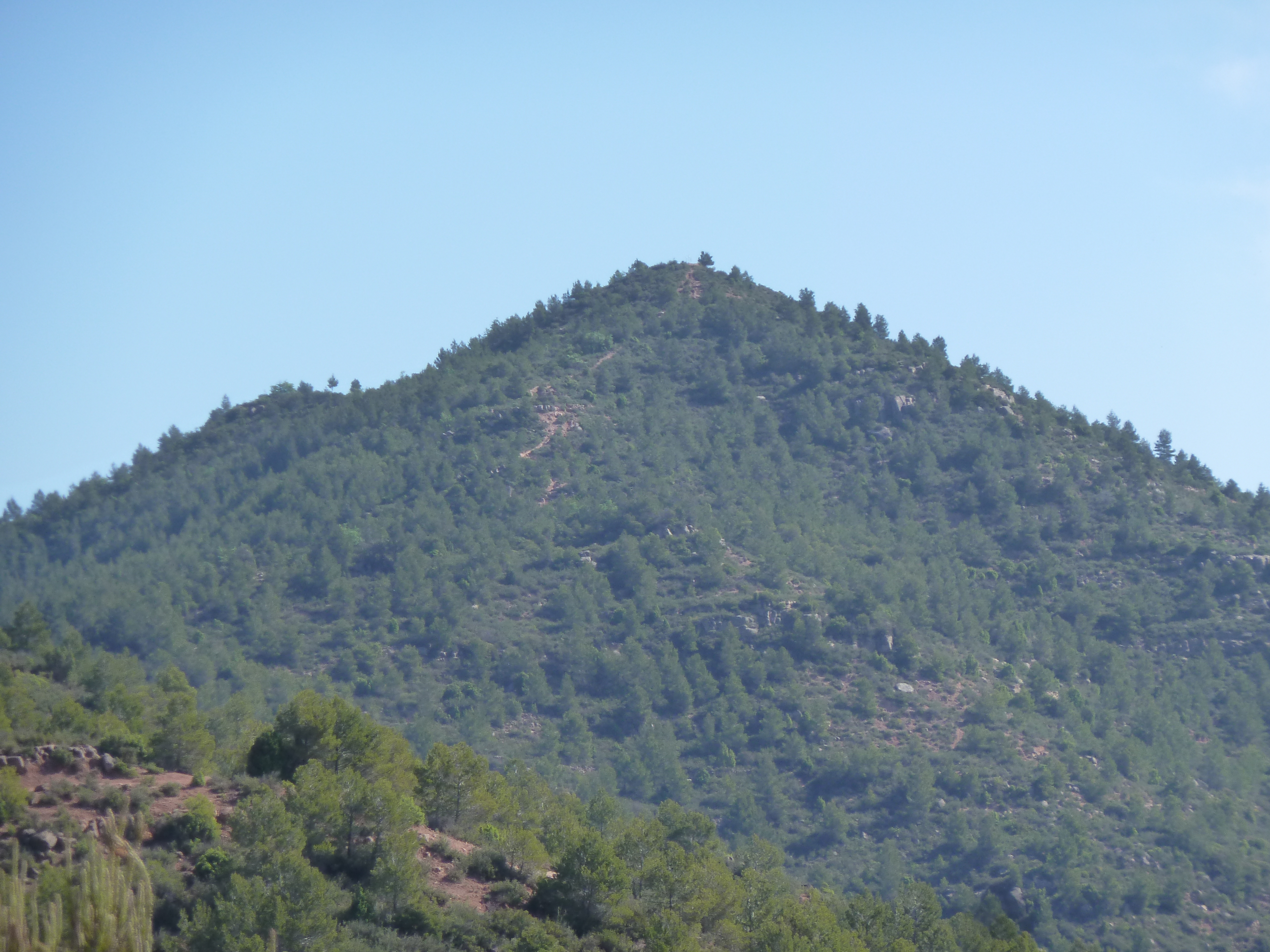 Vista de la muntanya del Turó de les Tres Creus